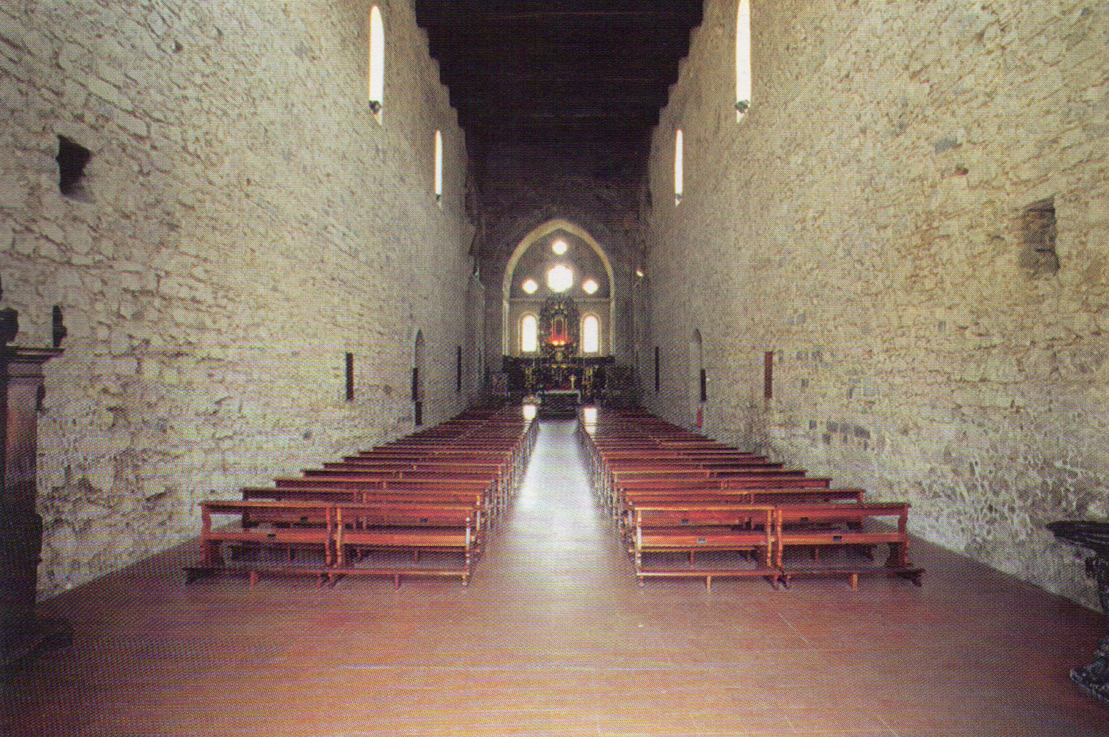 La navata centrale dell'Abbazia